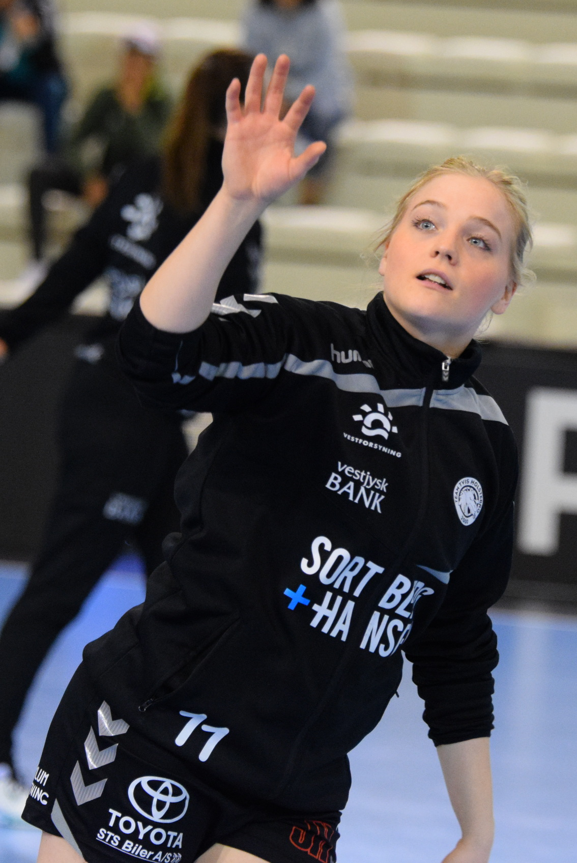 Laerke Nolsoe Pedersen Le 03 avril 2016 lors du match aller de demi-finale de la Coupe des vainqueurs de coupe de handball Issy Paris Hand / Team Tvis Holstebro